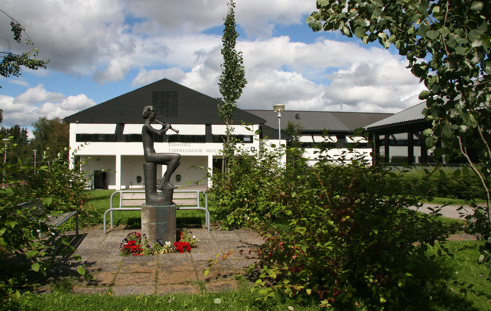 Eidsvoll videregående skole 2007 Med "Fløytespiller" av Sivert Donali i forgrunnen.